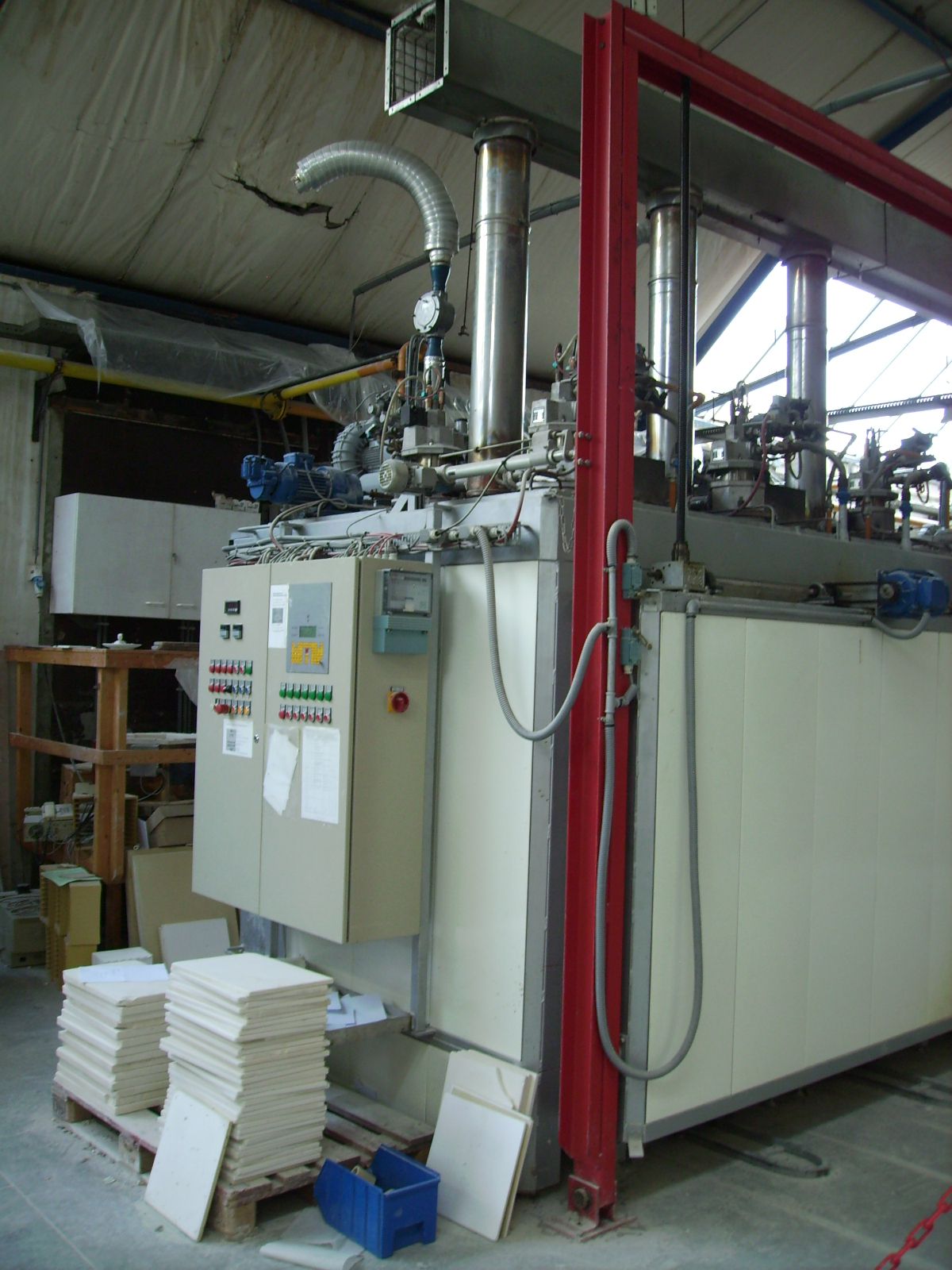 Brennofen. De Porceleyne Fles (vollständig De Koninklijke Delftsche Aardewerkfabriek „De Porceleyne Fles Anno 1653“ N.V., dt. wörtl. Die Königliche Porzellanflasche, engl. bekannt als Royal Delft) ist eine Delfter Porzellanmanufaktur mit einem Porzellanmuseum. Die 1653 gegründete Manufaktur ist ursprünglich für ihre als Delfter Blau oder Delfter Ware bezeichneten Fayencen bekannt.